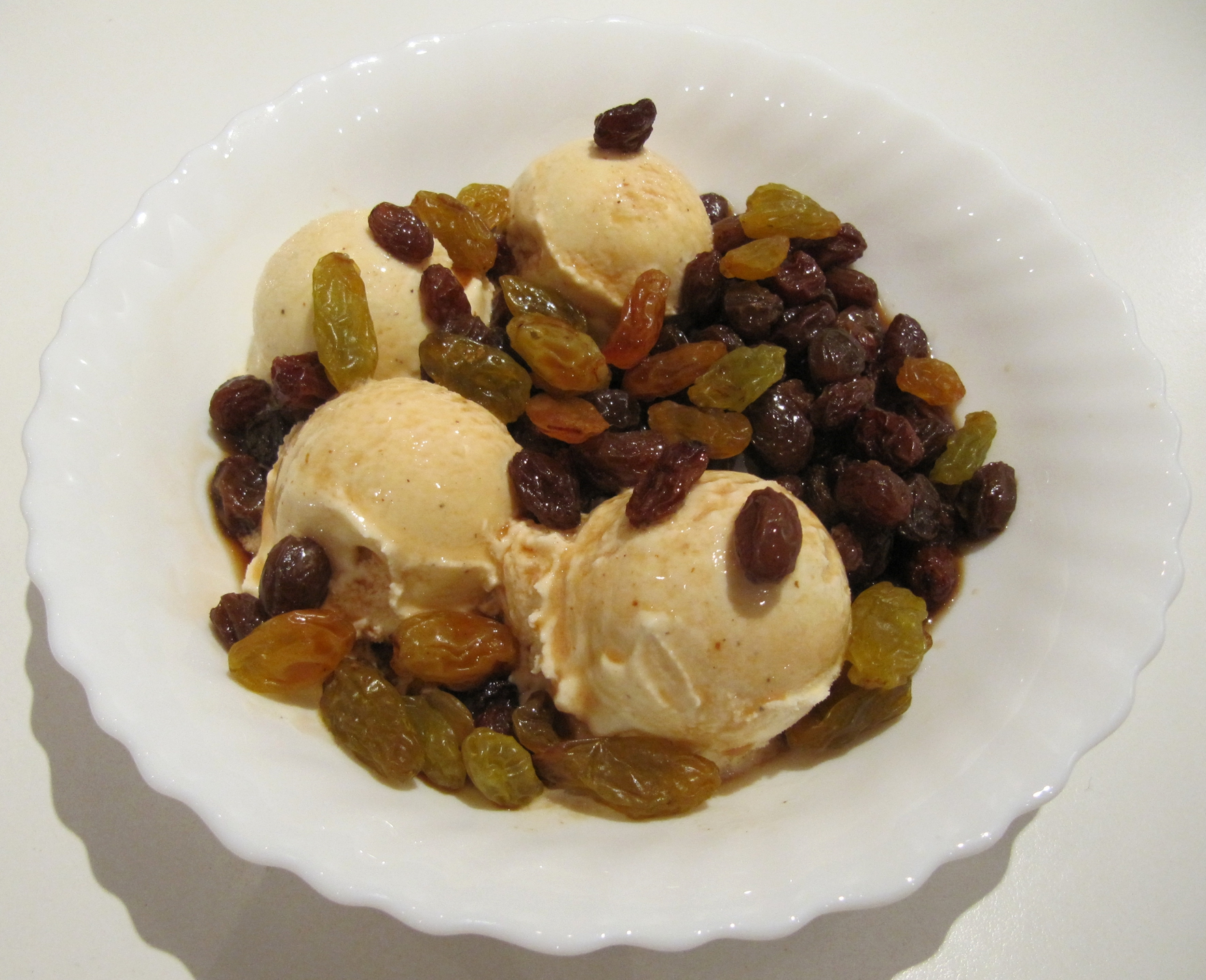 Vanilleis Malaga-Style mit in Malaga eingelegten Rosinen und Weinbeeren